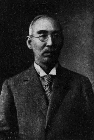 佐藤沢（1969-1948）